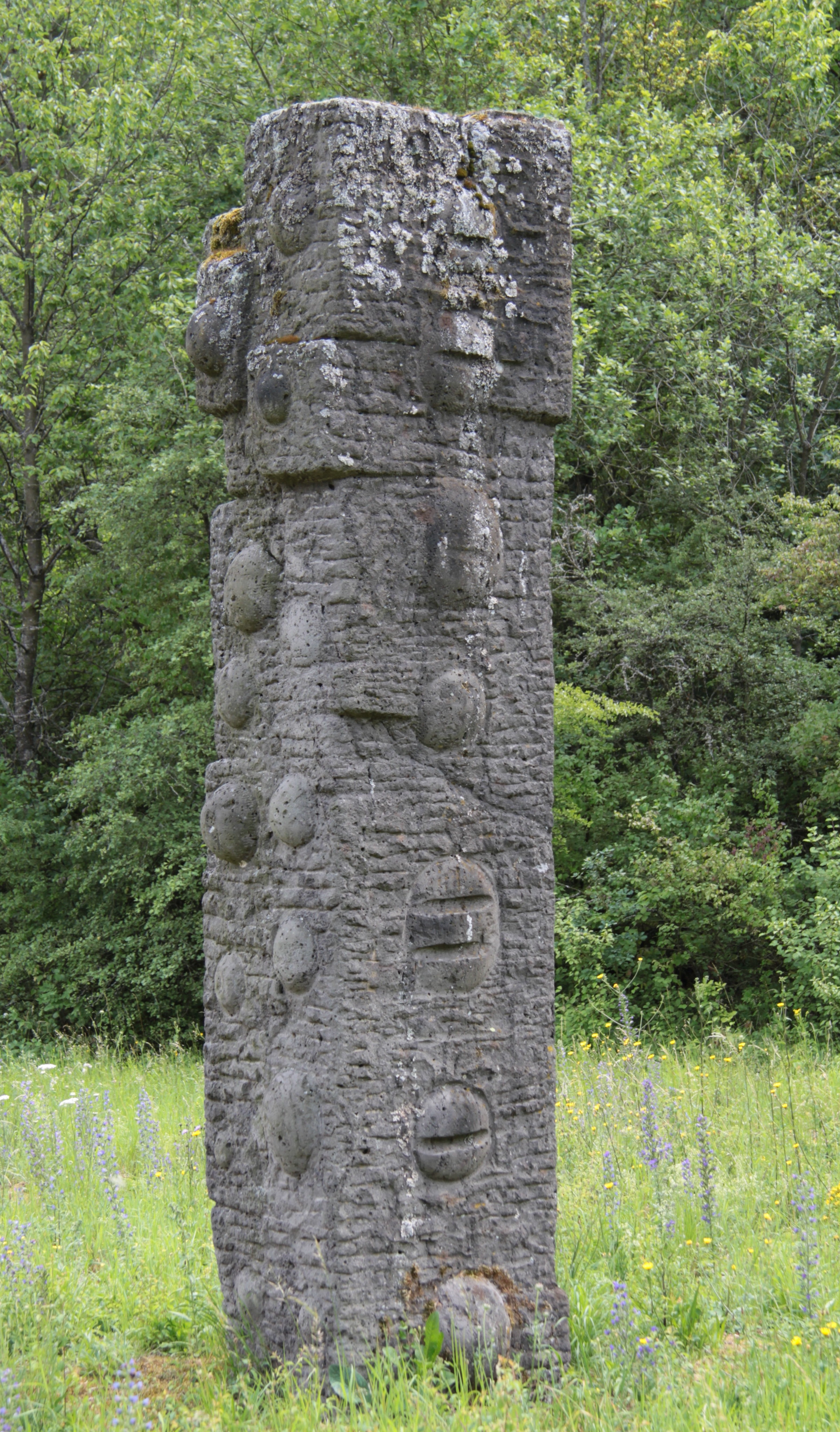 Erich Reischke (1961): 1. Internationales Bildhauersymposion in der BRD in Gaubüttelbrunn